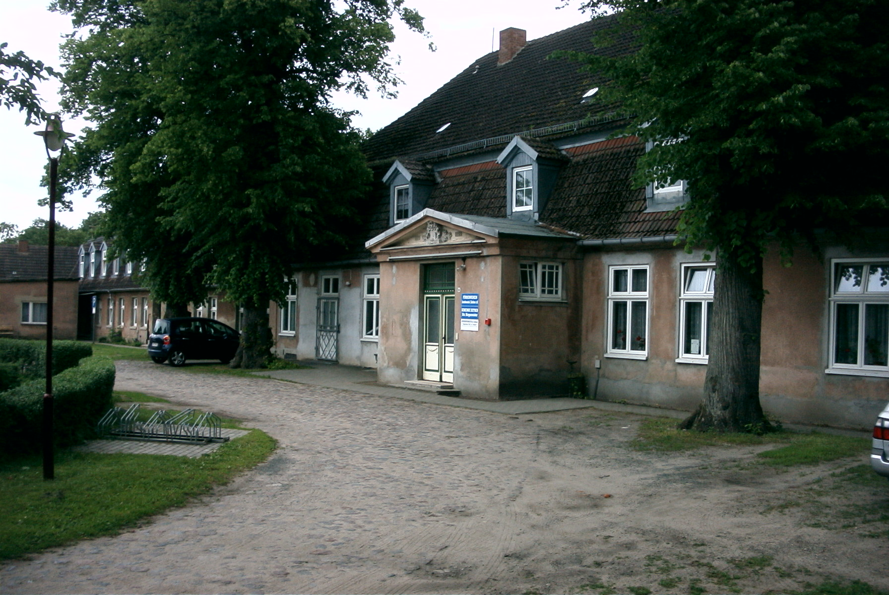 Gutshaus Ziethen von 1818/1922